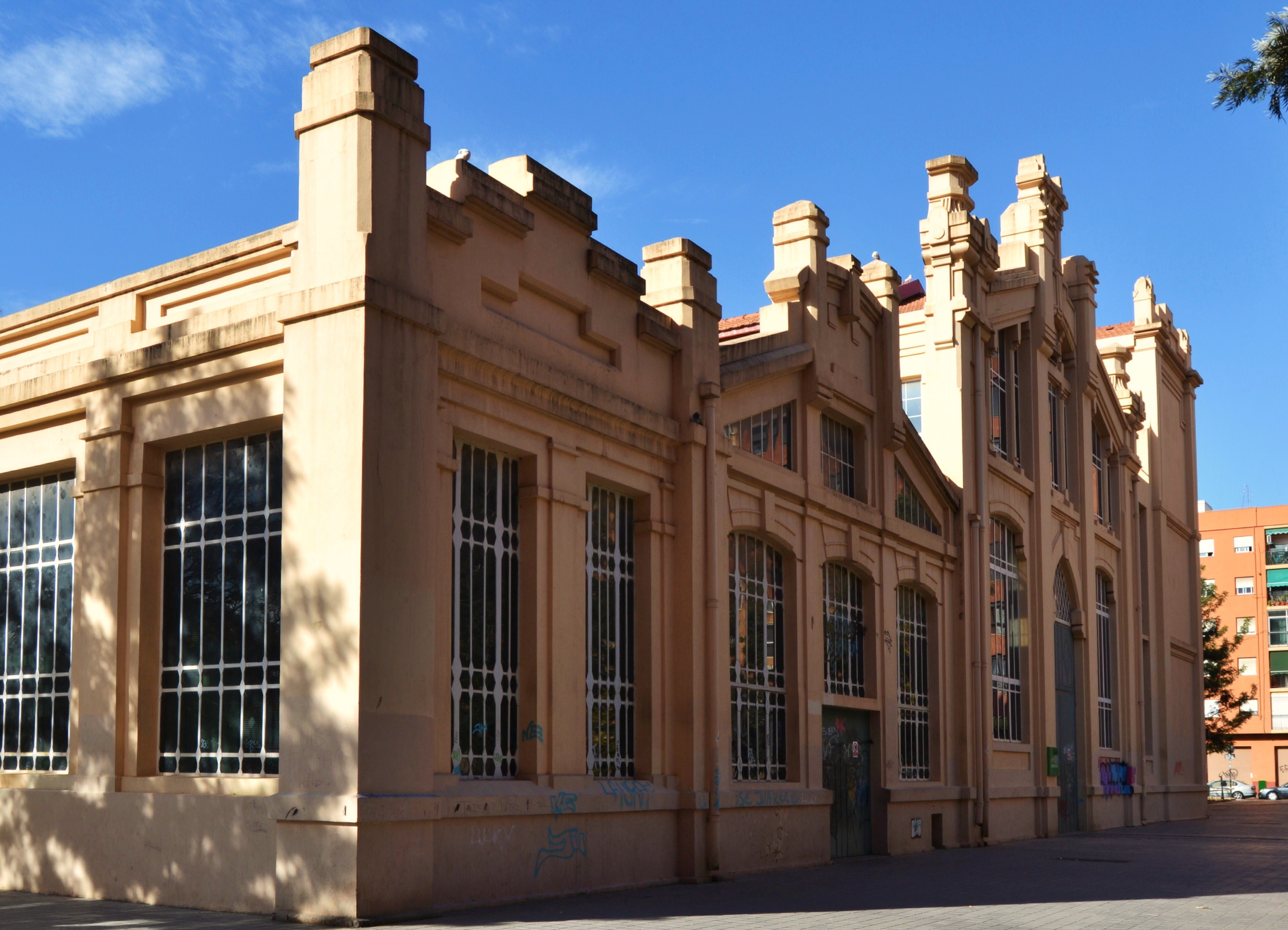 Antiga central elèctrica de Nou Moles.